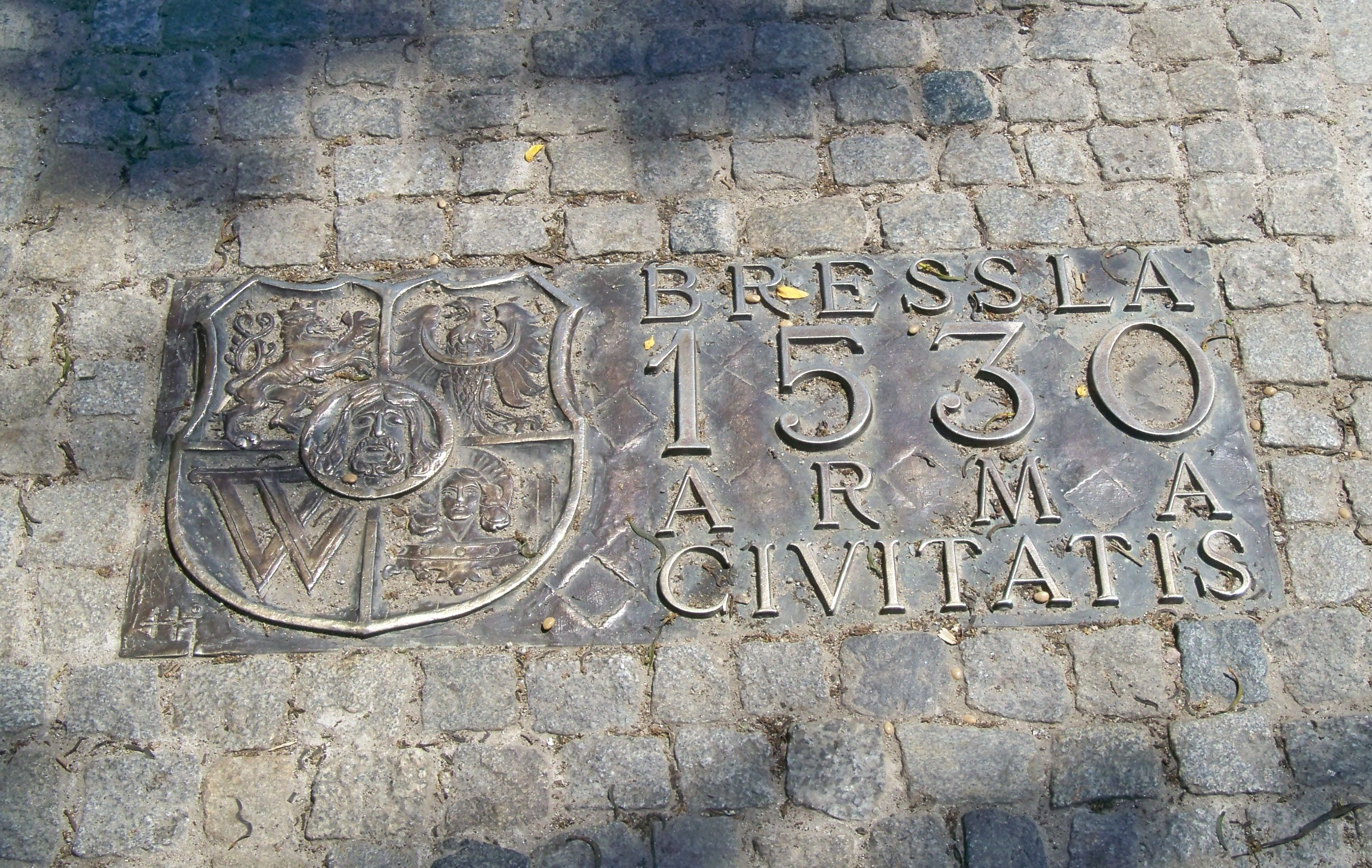 Ścieżka historii we Wrocławiu – przyznanie miastu obecnego herbu (1530)